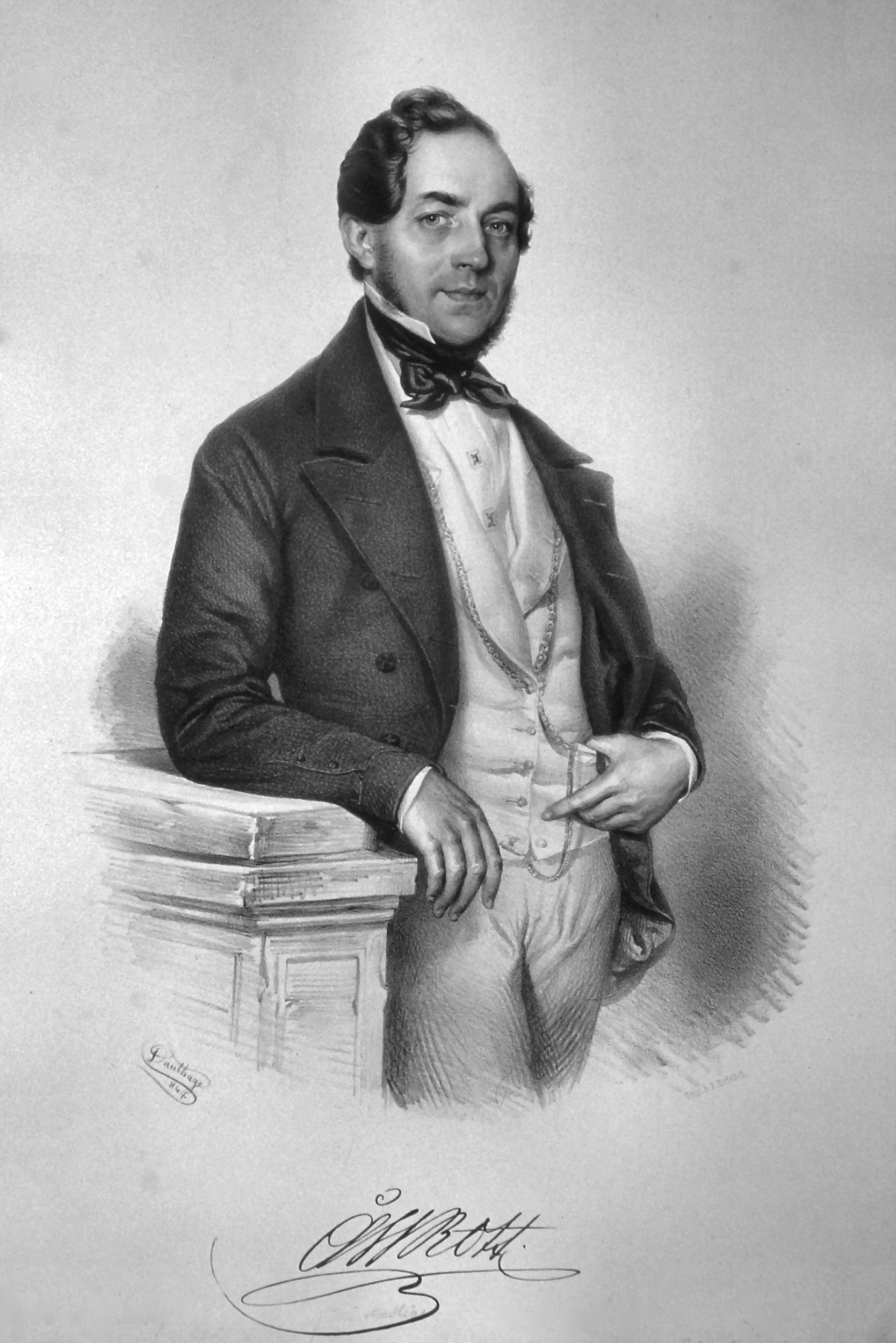 Karl Matthäus Rott (1807-1876), Musiker, Komponist, Rregisseur, Schauspieler. Lithographie von Adolf Dauthage, 1847.